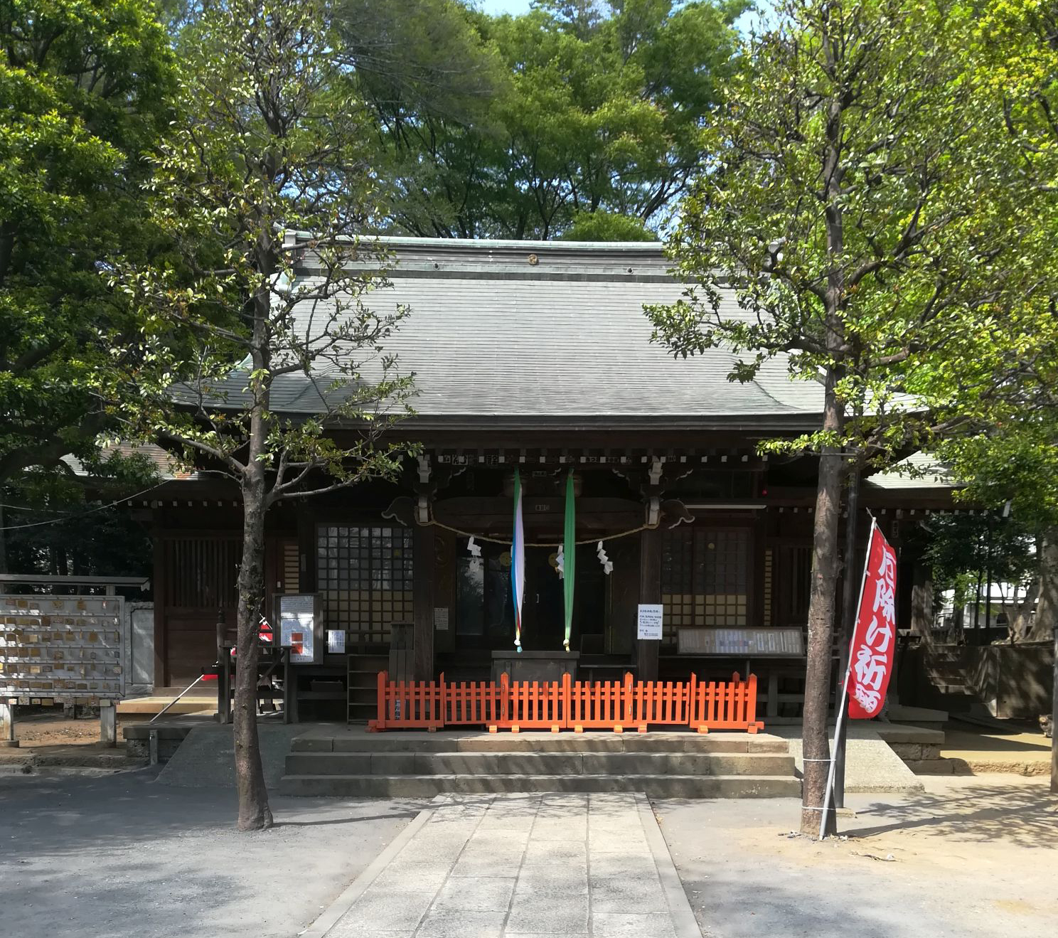 高松八幡神社(東京都練馬区高松)社殿